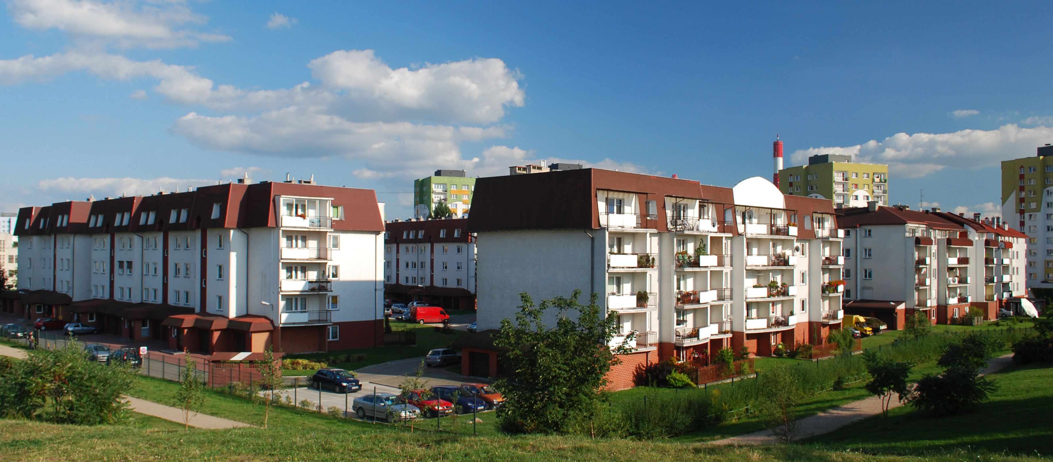 Osiedle Widzewska Górka na Widzewie Wschodzie w Łodzi.